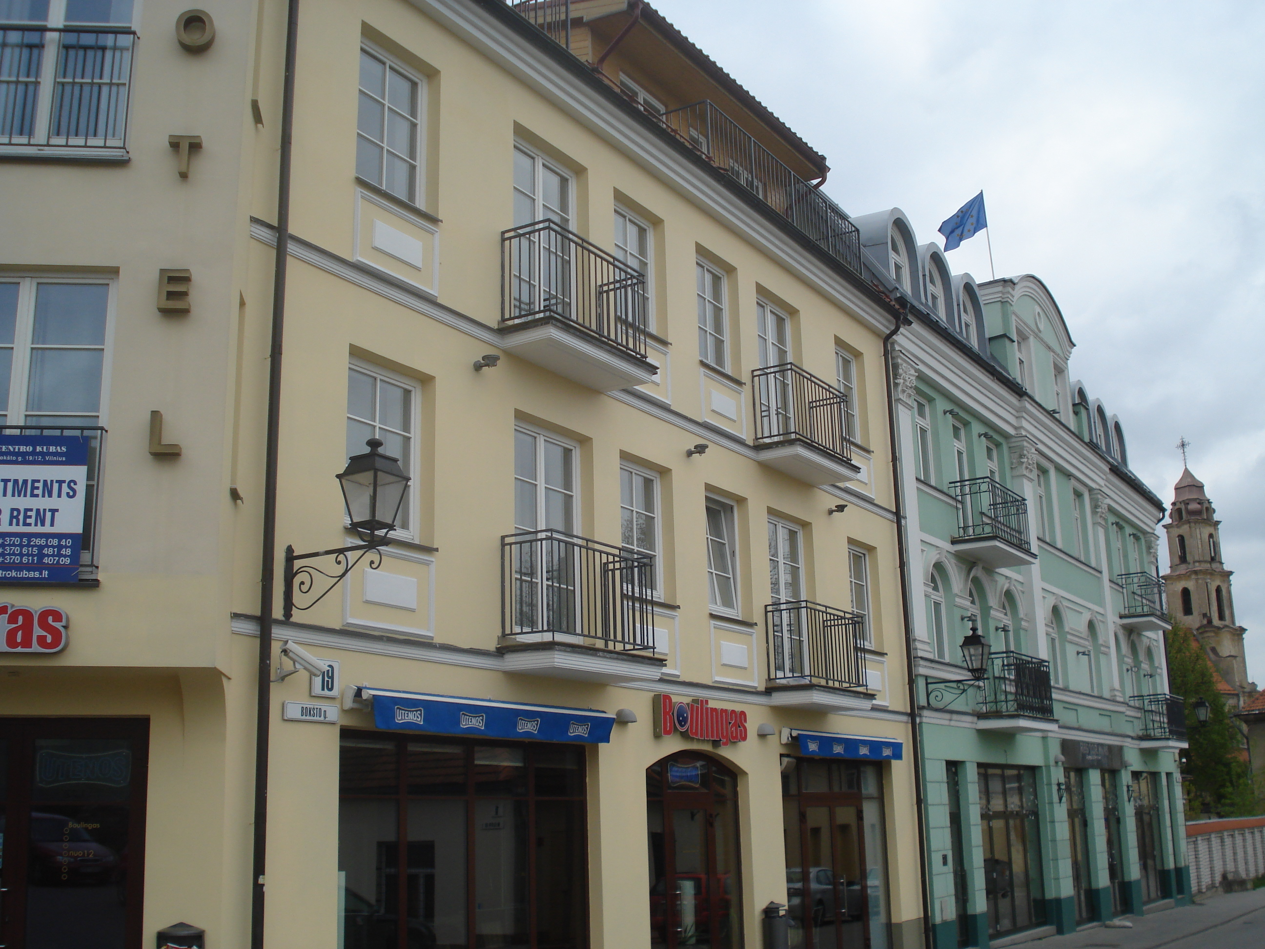 Bokšto gatvė (Bokshto street) in Vilnius